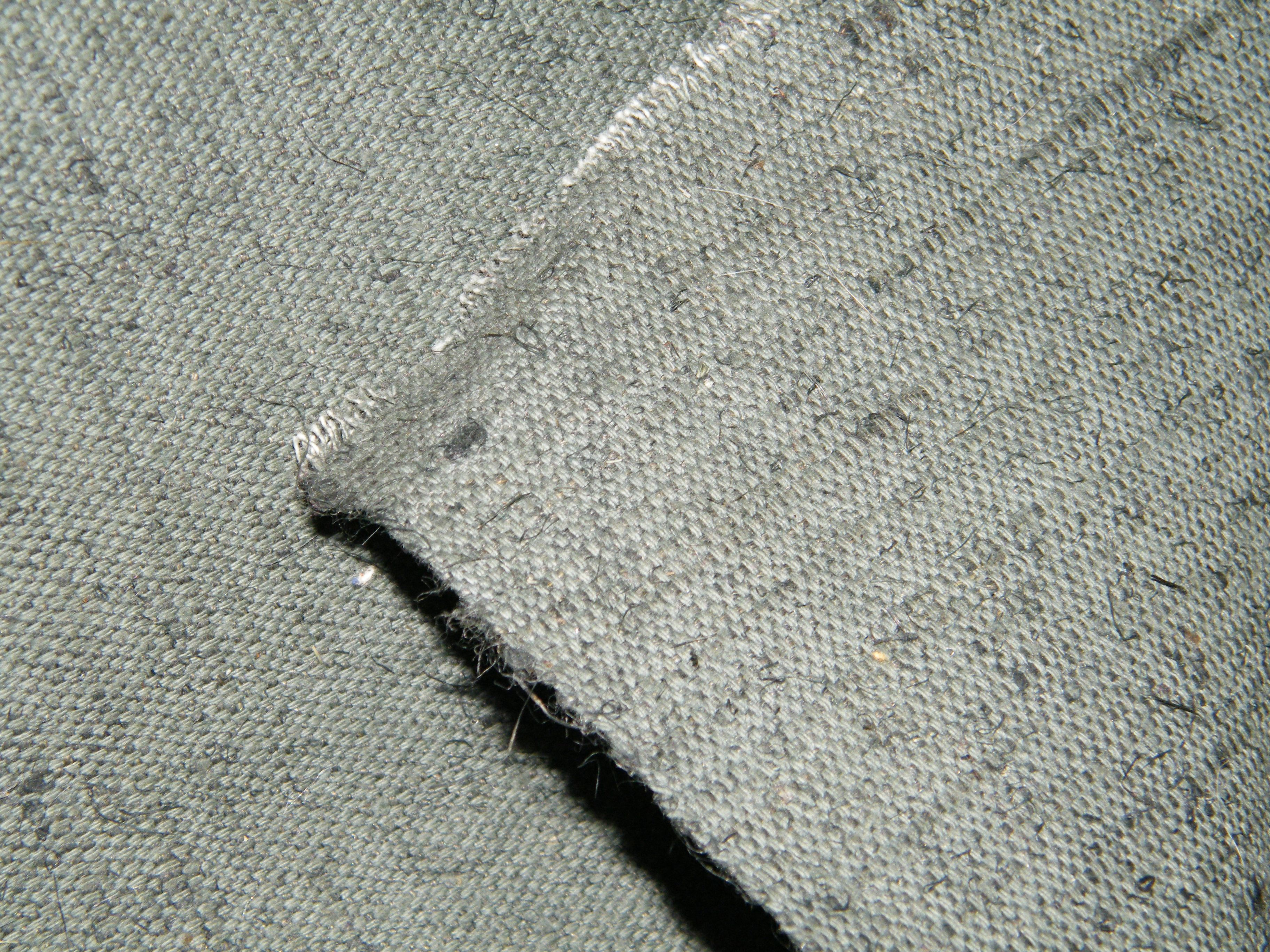 Брезент